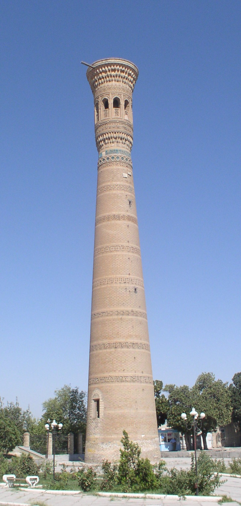 minaret in Vobkent, Uzbekistan